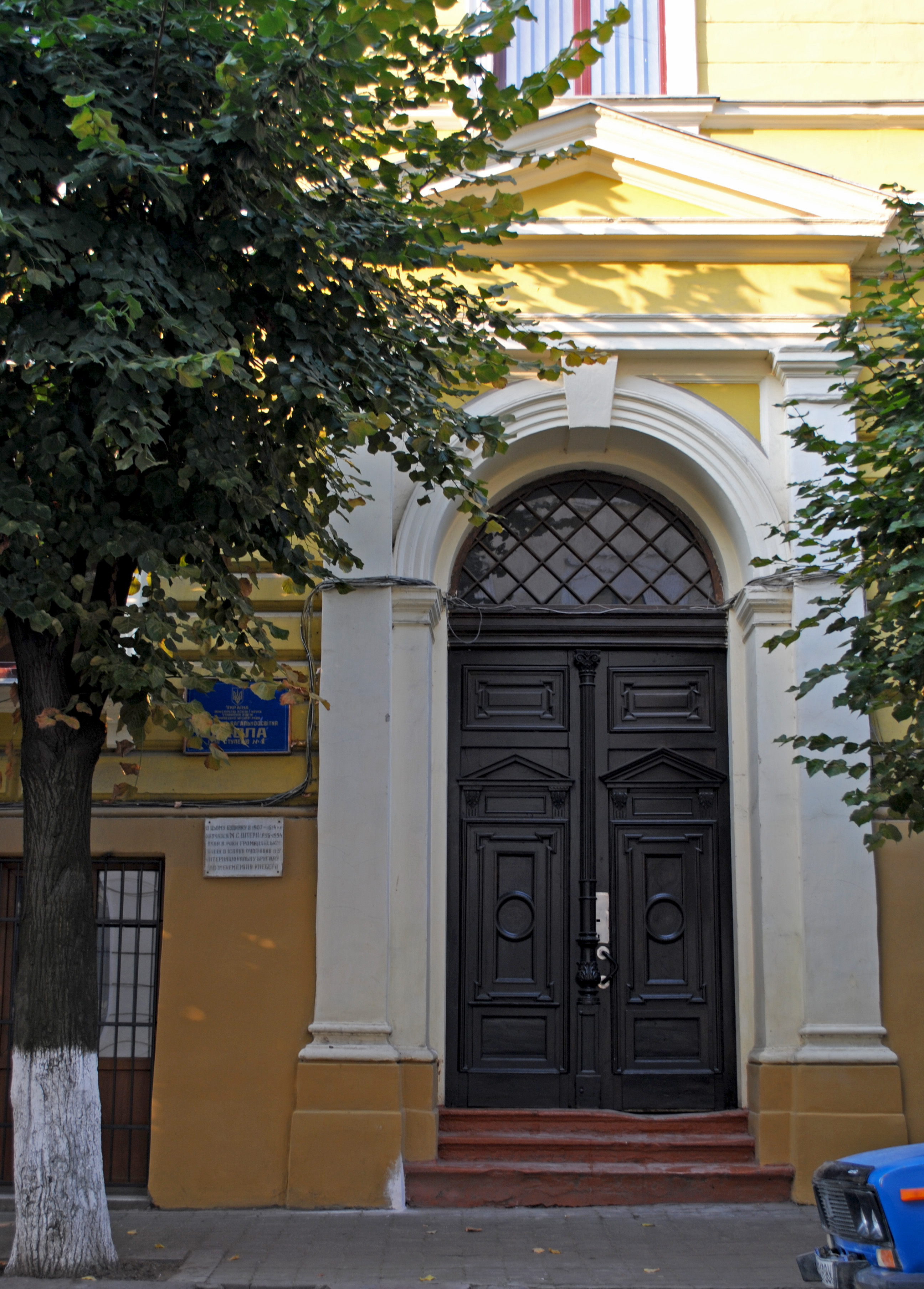 Гімназія, Чернівці, Франка Івана, 2 – Емінеску Михая, 1